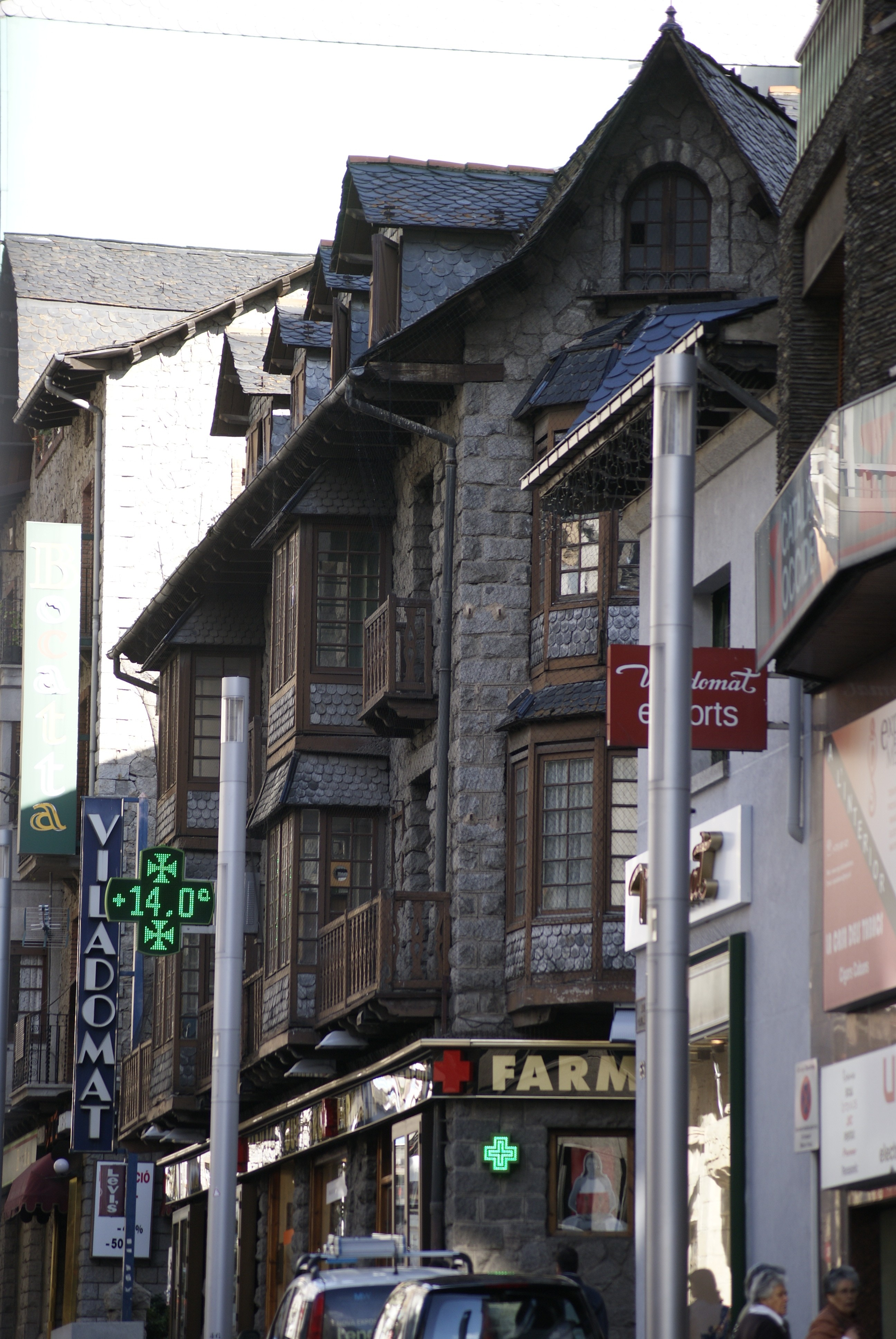 Casa Lacruz (Escaldes-Engordany)